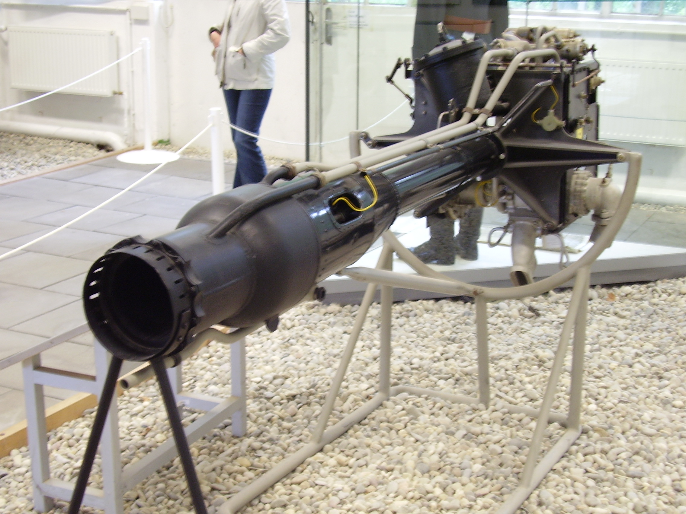 Luftwaffenmuseum der Bundeswehr; Airforce Museum of the Bundeswehr; Berlin-Gatow